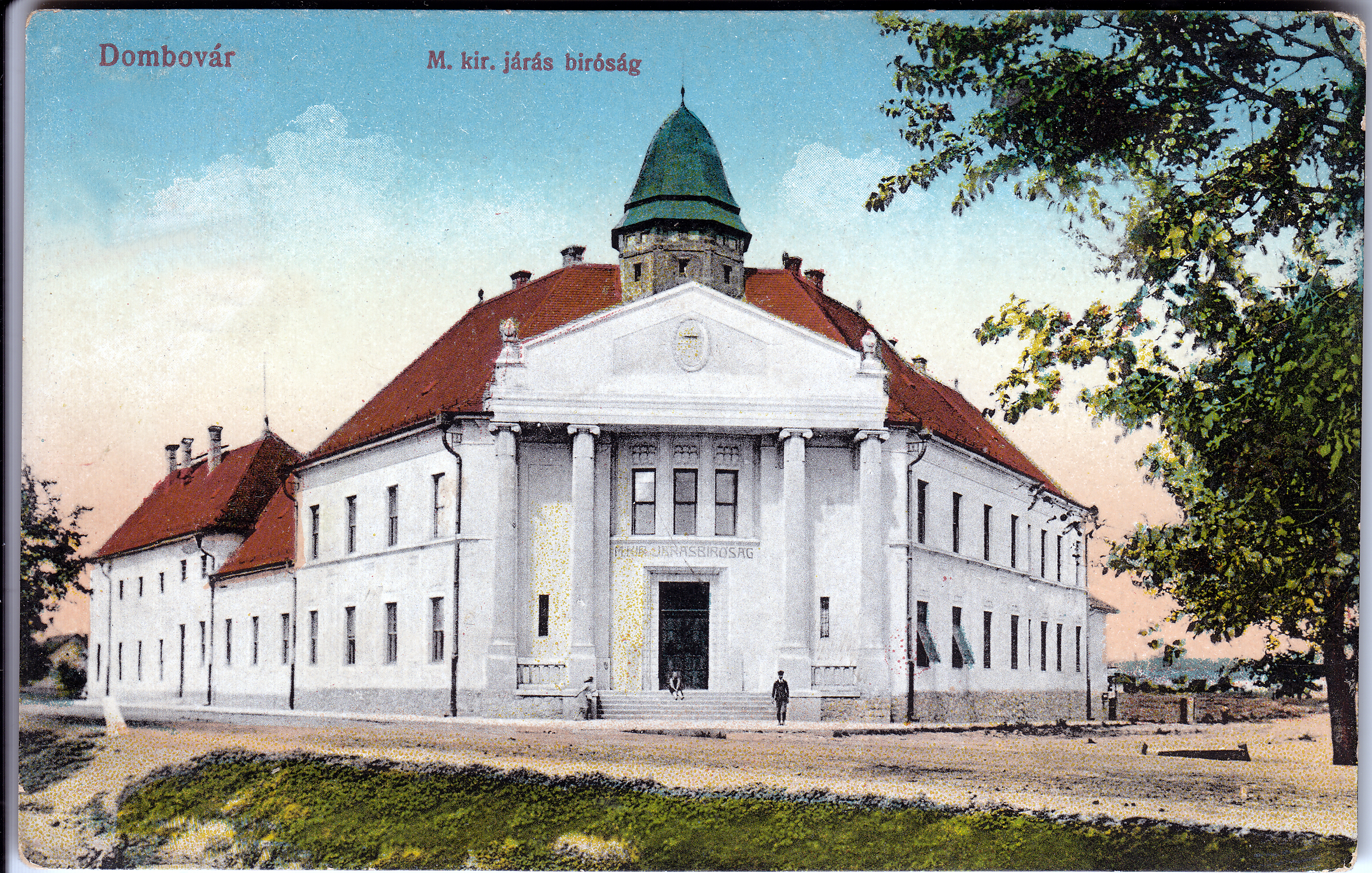 A dombóvári járásbíróság régi képeslapon